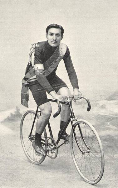 Paul Bourrillon (* 1877 ; 1942) coureur français